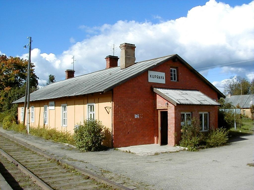 Kupravas stacija 2000-09-14